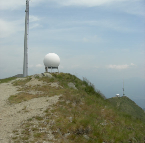 Gipfelbild des Monte Lema